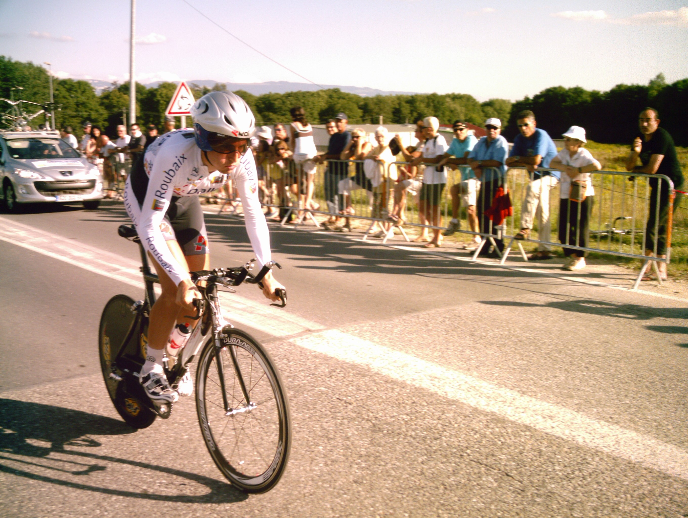 Bastien Delrot au départ du contre-la-montre de la troisième étape b du Tour de l'Ain 2009.